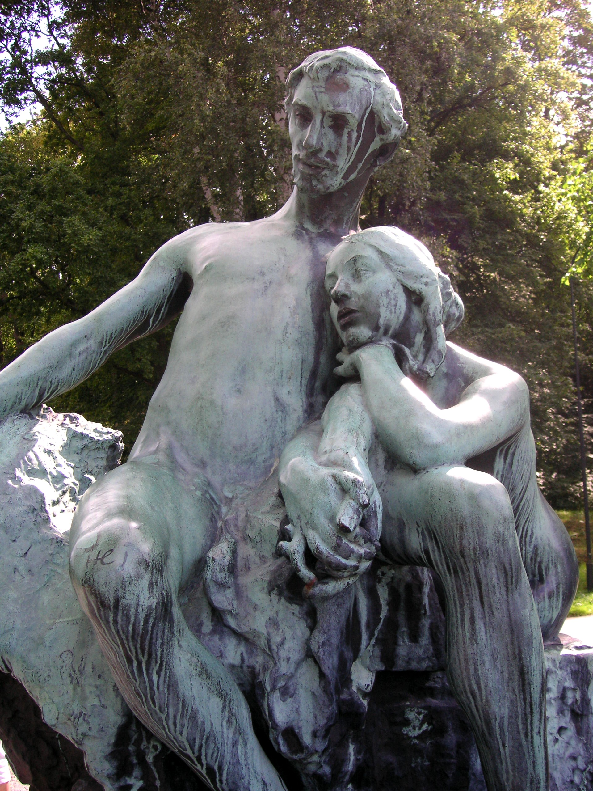 Christian Eriksson (1858-1935), "Idyll", naketgruppen i brons av man och kvinna restes åren 1904-1907 på Kärleksudden på Djurgården för Djurgårdsförvaltningen, Stockholm.